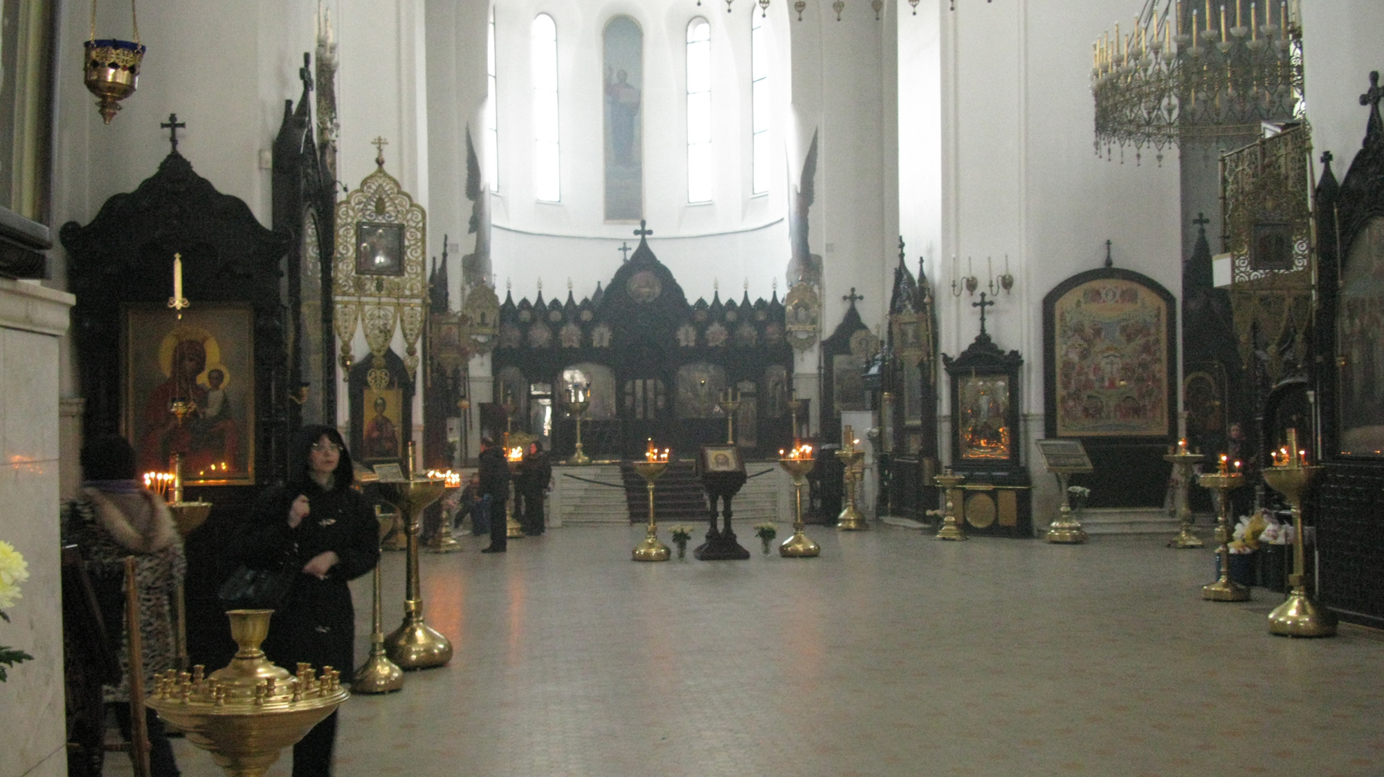 Храм Воскресения Христова в Сокольниках